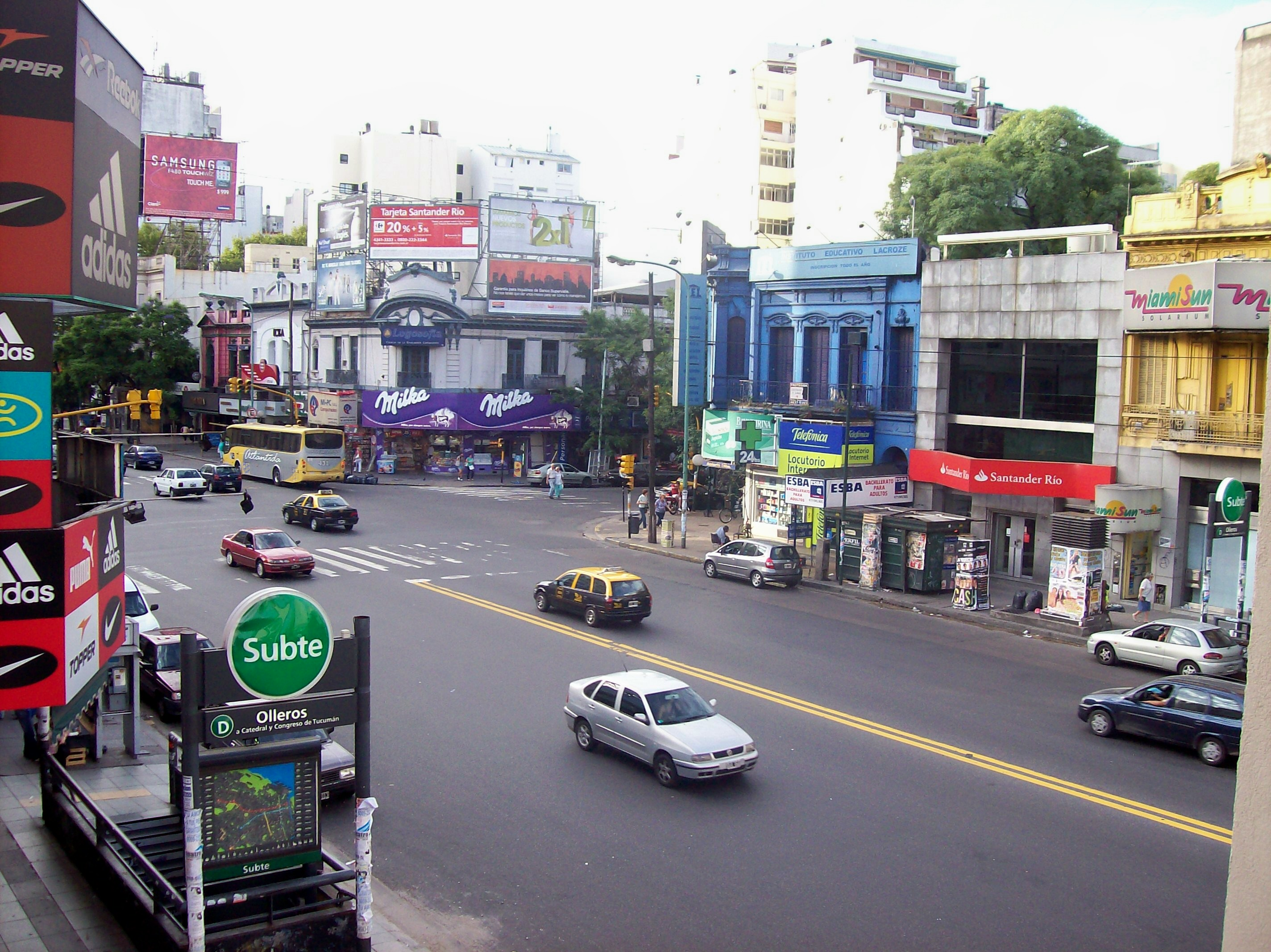 Intersección de Avenida Cabildo (la que se ve en primer plano) con la Avenida Federico Lacroze en el barrio de Colegiales (Buenos Aires) en dirección SSE a NNO. Se ve una de las entradas a la estación Olleros del subte de la línea D